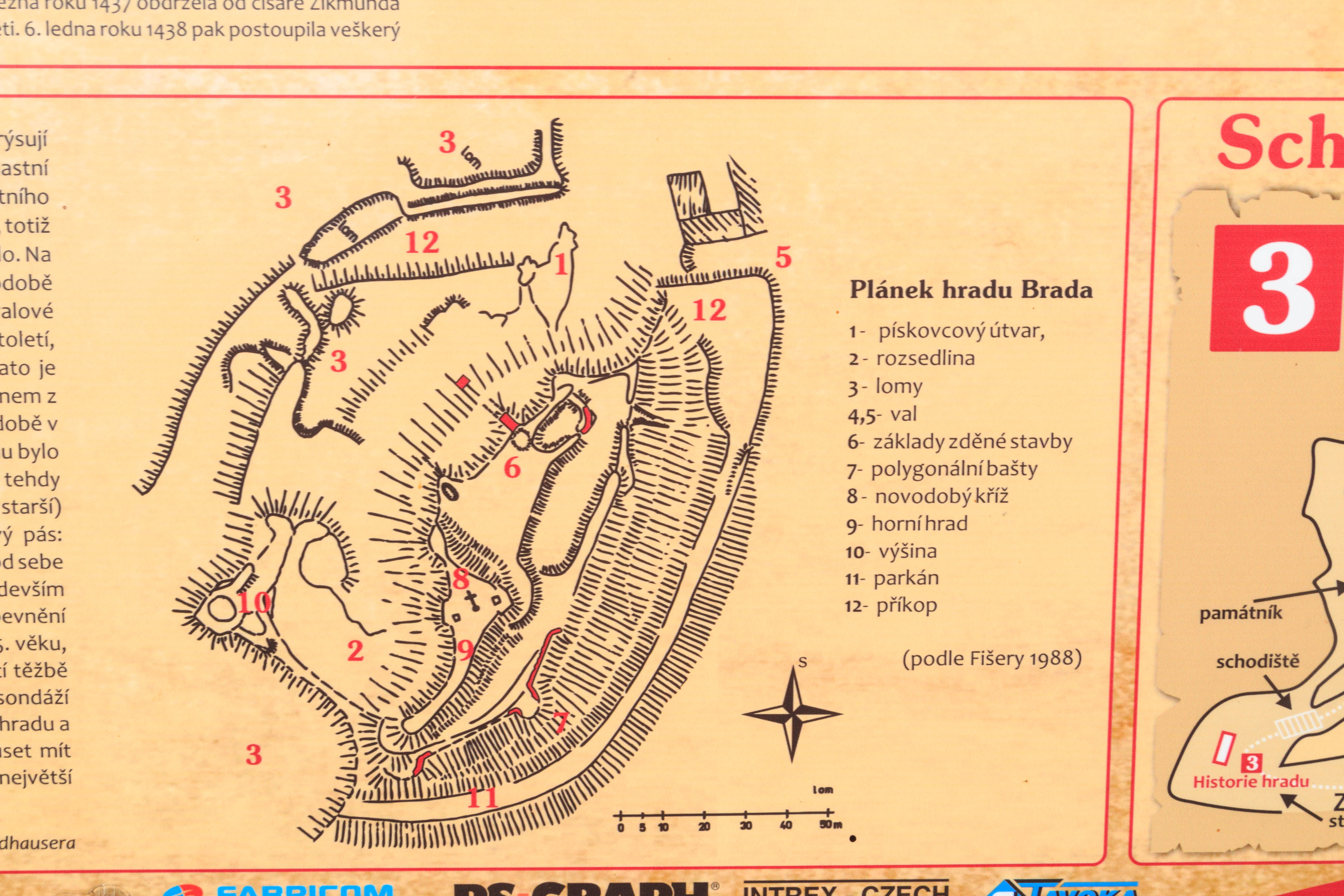 Hrad Brada, Brada (Brada-Rybníček).